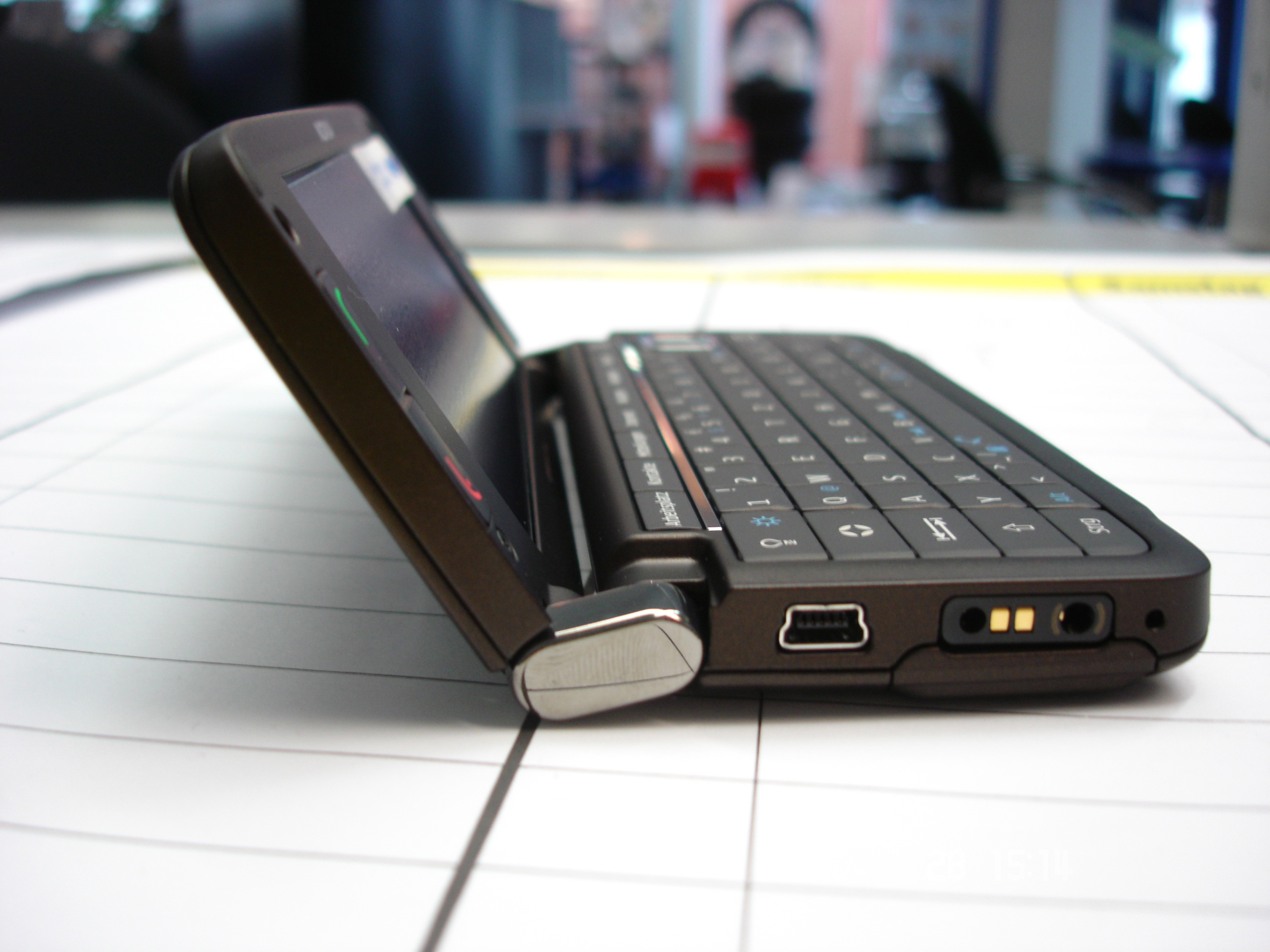 Nokia E90, ueberarbeitete Version